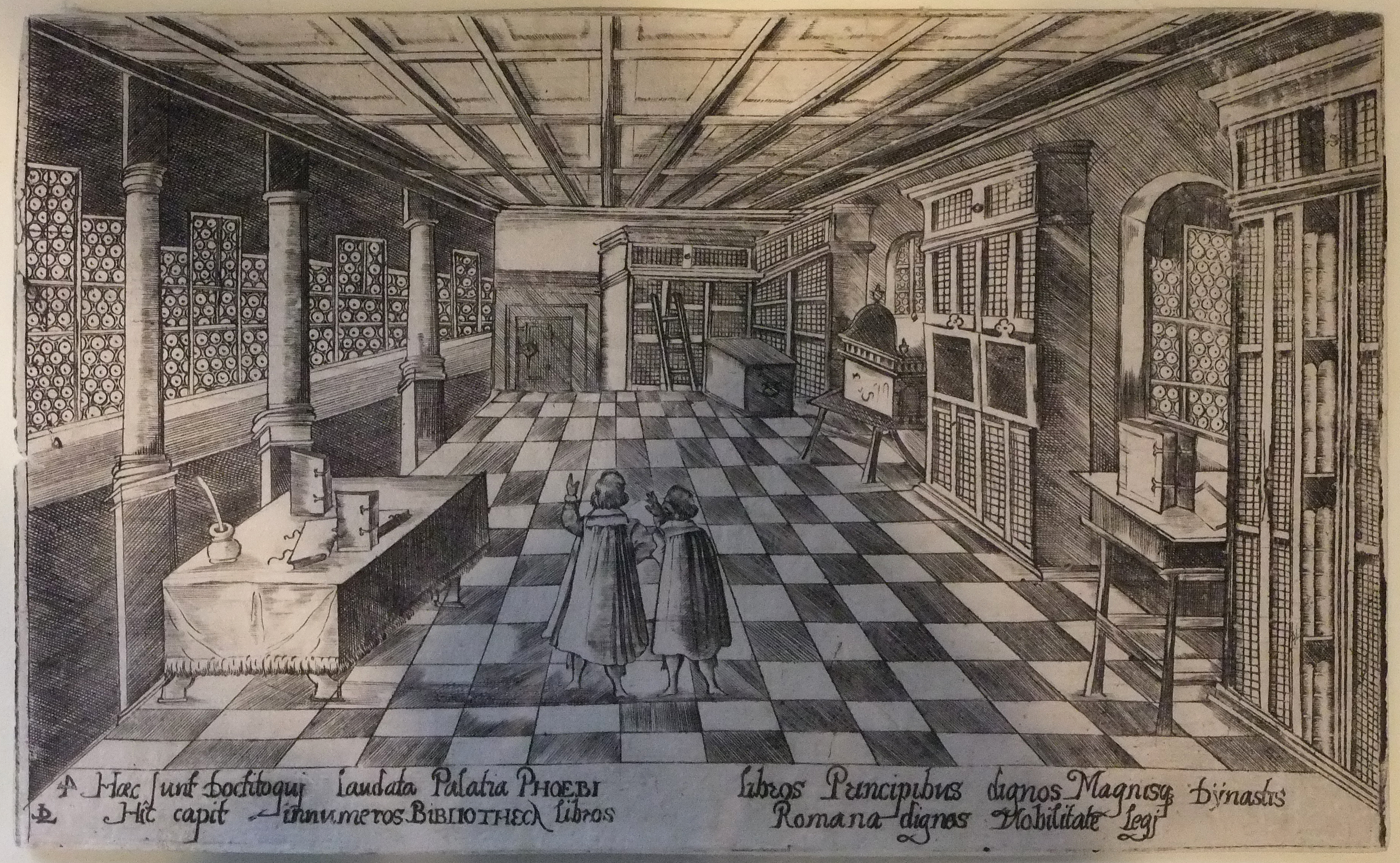 Collegium Illustre. Bibliothek (Radierung; Stadtmuseum Tübingen Inv. 1084)